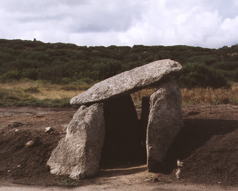 Dolmen 3 at Meninas do Crasto, Baião, Portugal